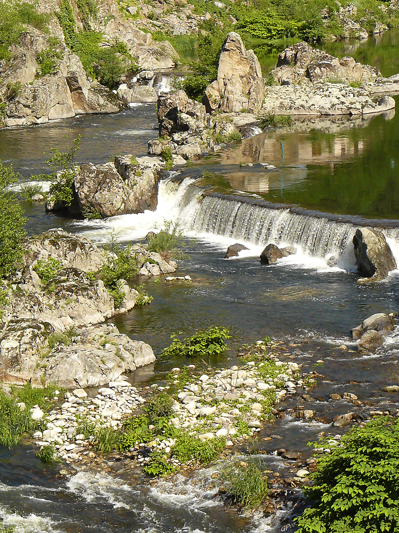 Vue en amont de l'Eyrieux depuis le pont de Saint Sauveur de Montagut(20 km environ du confluent du Rhône), sur un lit granitique, débit moyen après des pluies de printemps. Deux "levées" construites, visibles, permettaient l'utilisation de la force hydraulique par des canaux latéraux conduisant l'eau à des turbines d'usines